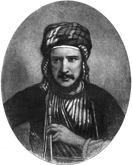 "D'Escayrac de Lauture, dessiné par Kreutzberger d'après la photographie de Mayer et Pierson."